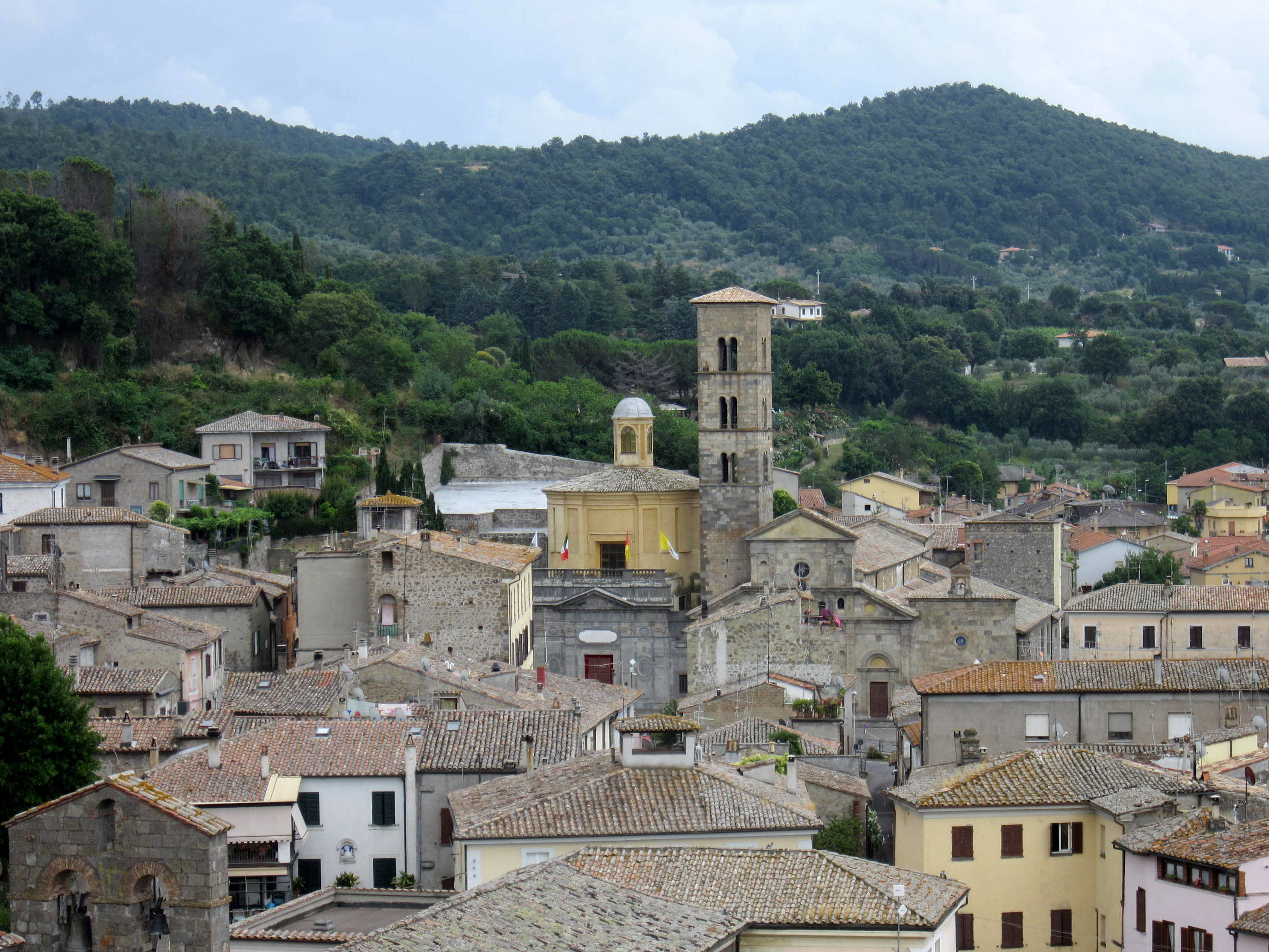 Veduta del centro di Bolsena